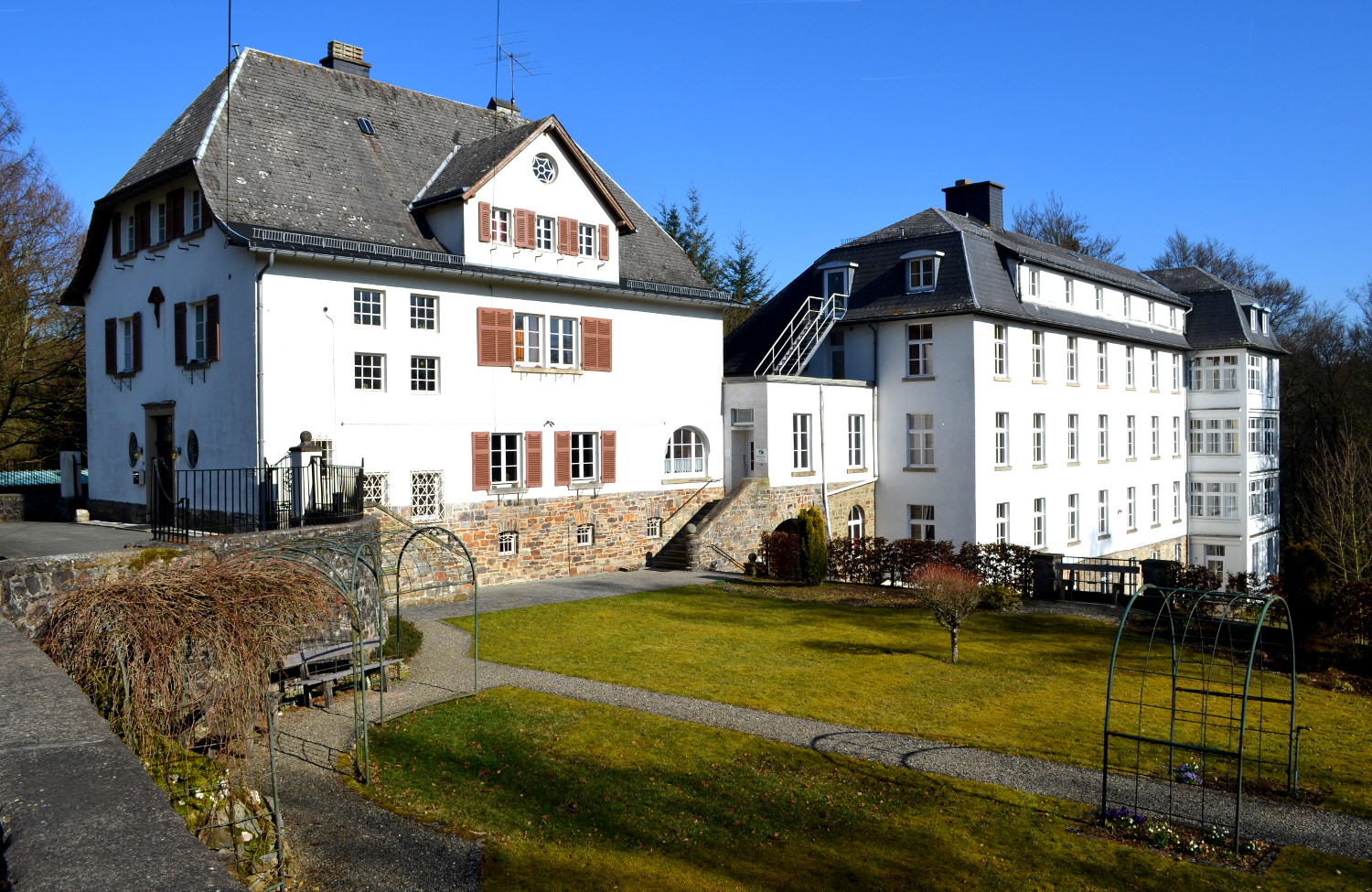 Kloster Montenau, Gemeinde Amel, Belgien